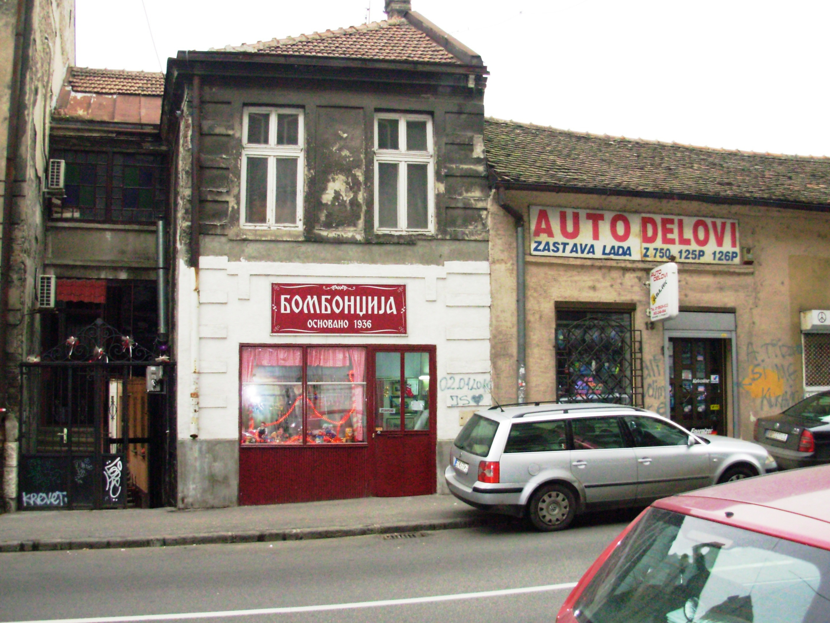 Бомбонџијска радња у Београду. Сликао Голдфингер.